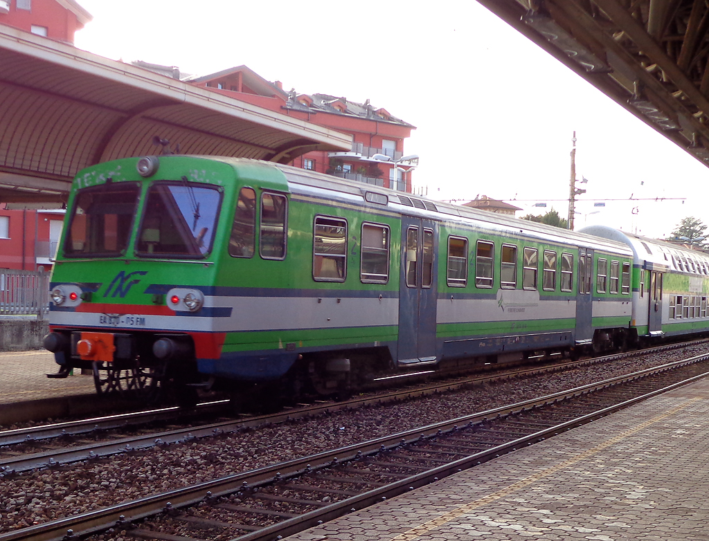 Carrozza pilota EA 870-05 delle Ferrovie Nord Milano (tipo Socimi) in coda a un treno in partenza da Tradate.